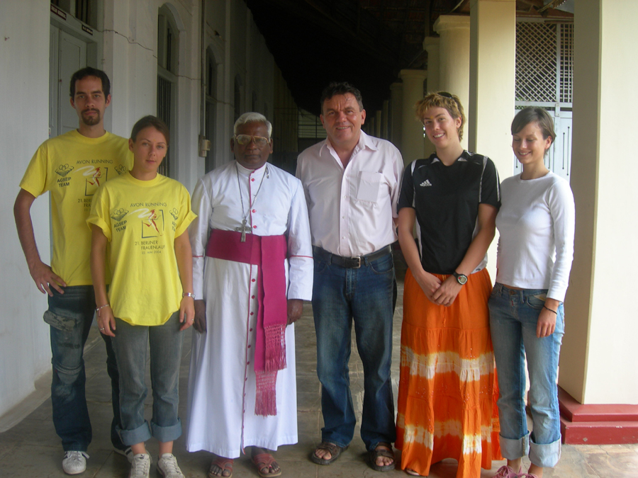 AGSEP trifft Bischof v. Jaffna vom 29.07.2006 bis 29.07.2006 Eine 5 kopefige AGSEP Delegation besuchte kuerzlich den Bischof von Jaffna, um weitere Sportaustausch-Aktionen mit dem Norden Sri Lankas auf den Weg zu bringen. Noch unklar ist, wie dieser geplante Austausch praktisch umgesetzt werden kann, da der Norden der Insel faktisch abgeschlossen ist u. der Zugang ueber die Bundesstrasse A 9 erheblich eingeschraenkt ist. Der Bischof v. Jaffna hat sich in der Vergangenheit leidenschaftlich fuer die Belange u. taegl. Sorgen der ueberwiegend tamilischen Bevoelkerung seiner Dioezese eingesetzt.